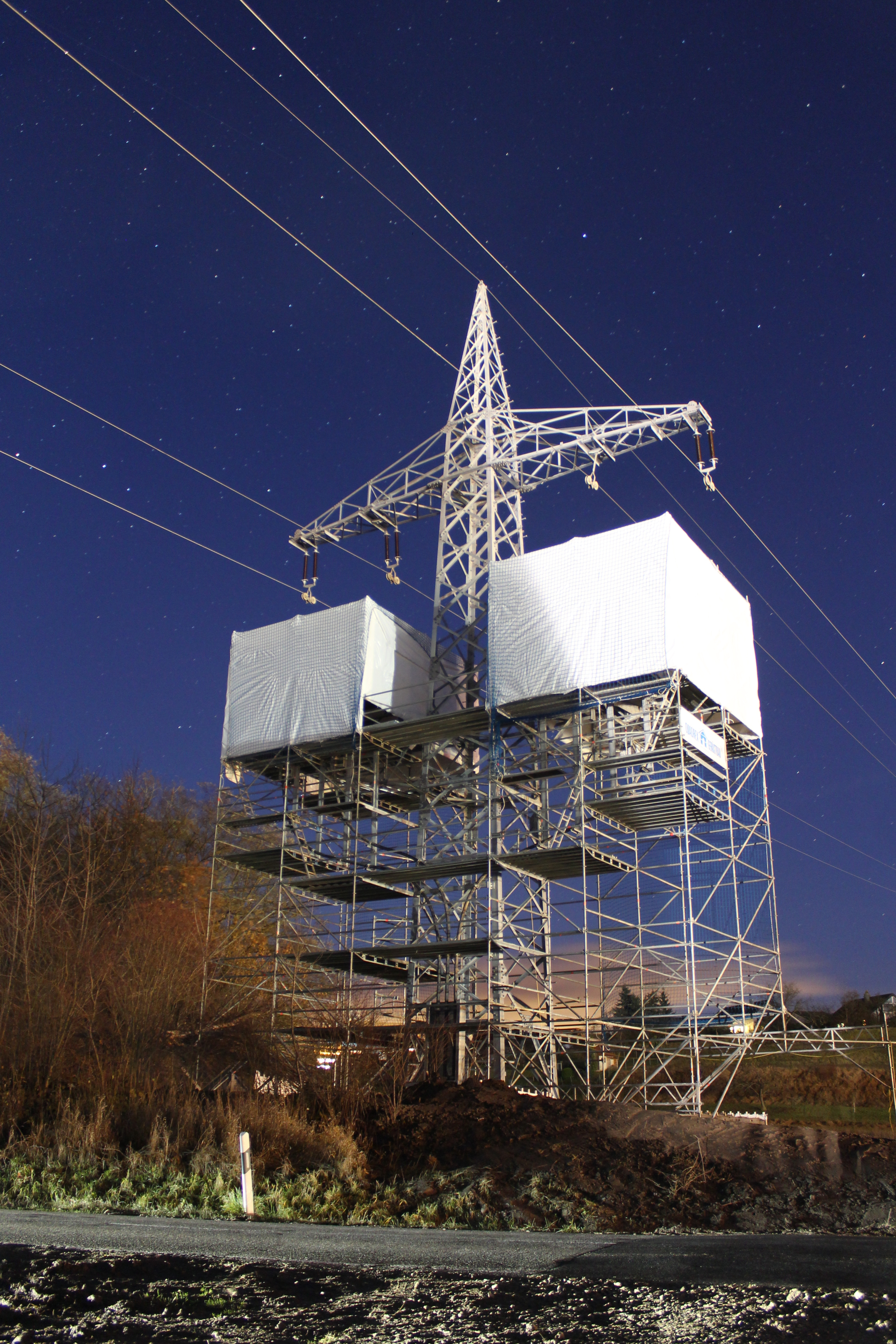 In Bau befindlicher Endmast (Anlage 601 Mast 65, 110 kV) bei Altingen in Ammerbuch, während der Montage der Kabelendverschlüsse